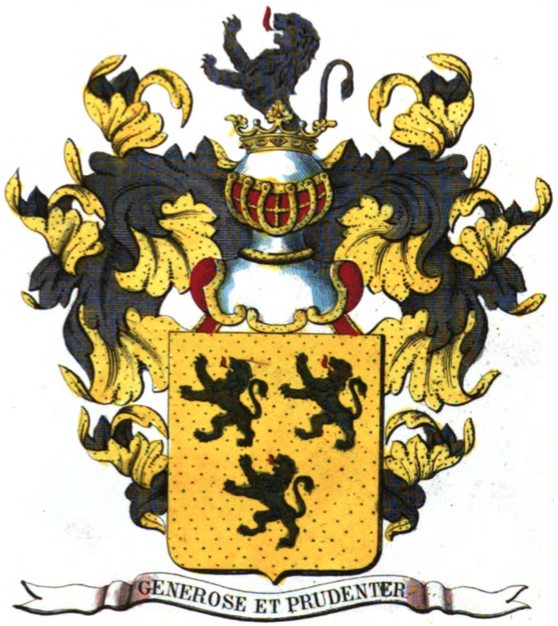 Armoiries de la famille de Ryckel